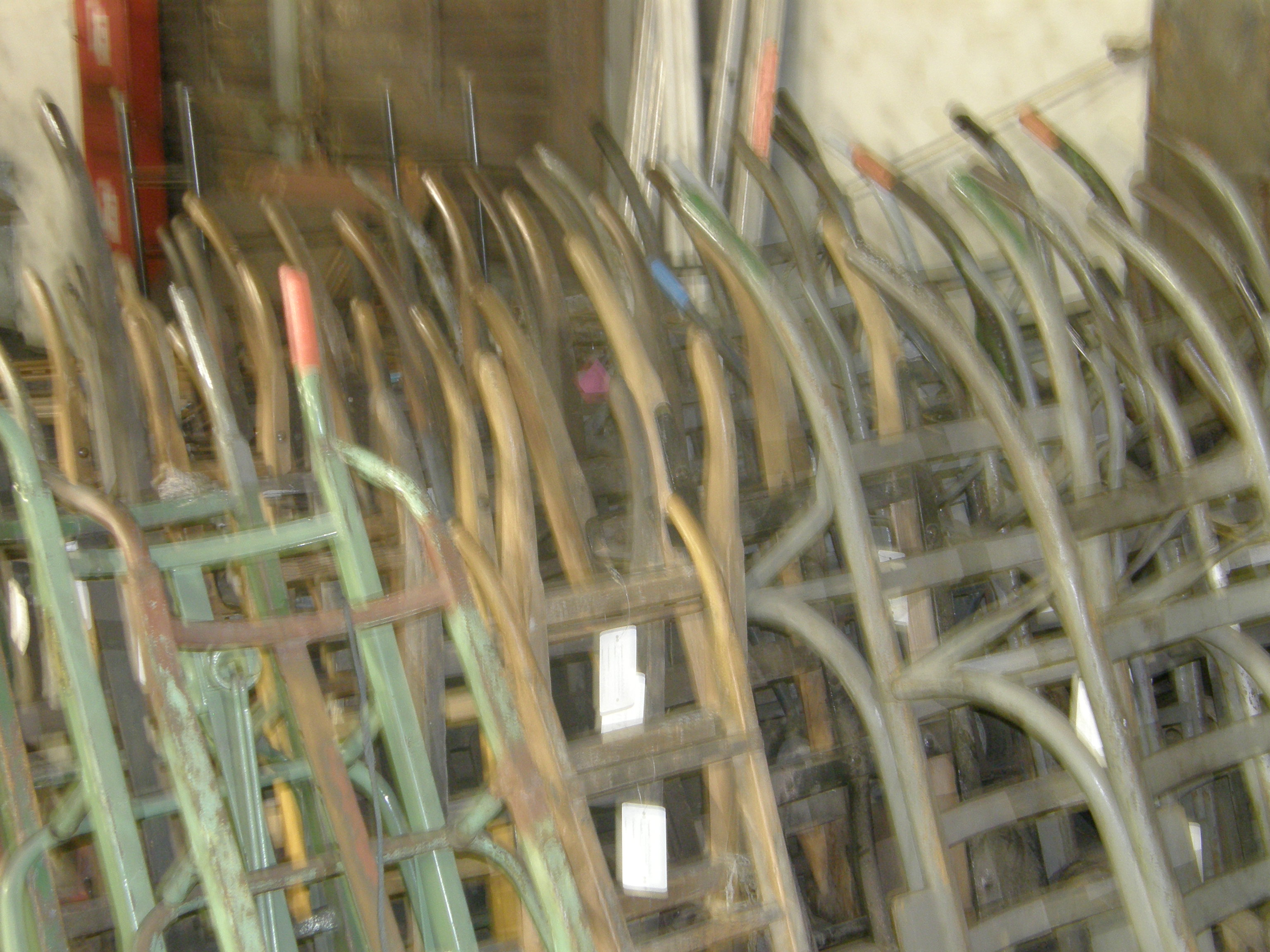 Sackkarren im Hafenmuseum Hamburg